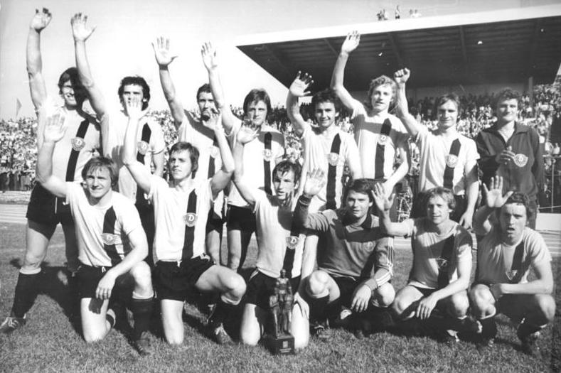 ADN-ZB-Mittelstädt-28.5.77-str-Berlin: FDGB-Pokal-Finale im Fußball SG Dynamo Dresden - 1. FC Lok Leipzig 3:2. Nach Erkämpfen des Meistertitels gelang den Dynamo-Spielern aus Dresden am 28.5. auch noch der Gewinn des FDGB-Pokals. Freude über den Gewinn der Trophäe. Stehend v.l.: Schmuck, Schade, Weber, Kotte, Häfner, Peterssohn, K. Müller, Schmidt. Knieend v.l.: Riedel, Sachse, Dörner, Boden, Heidler und M. Müller.